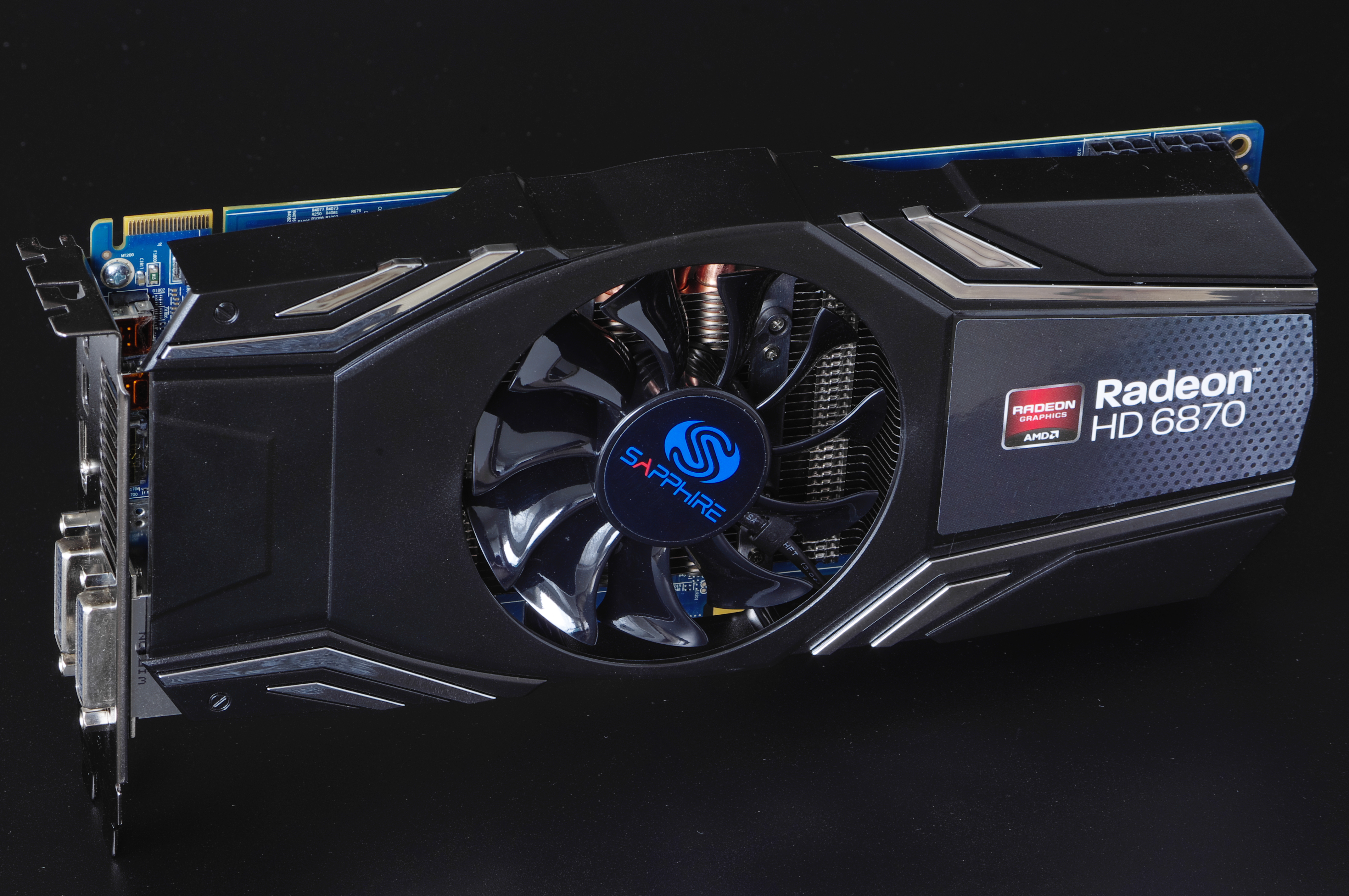 Sapphire radeon 6870 PCIe-Grafikkarte